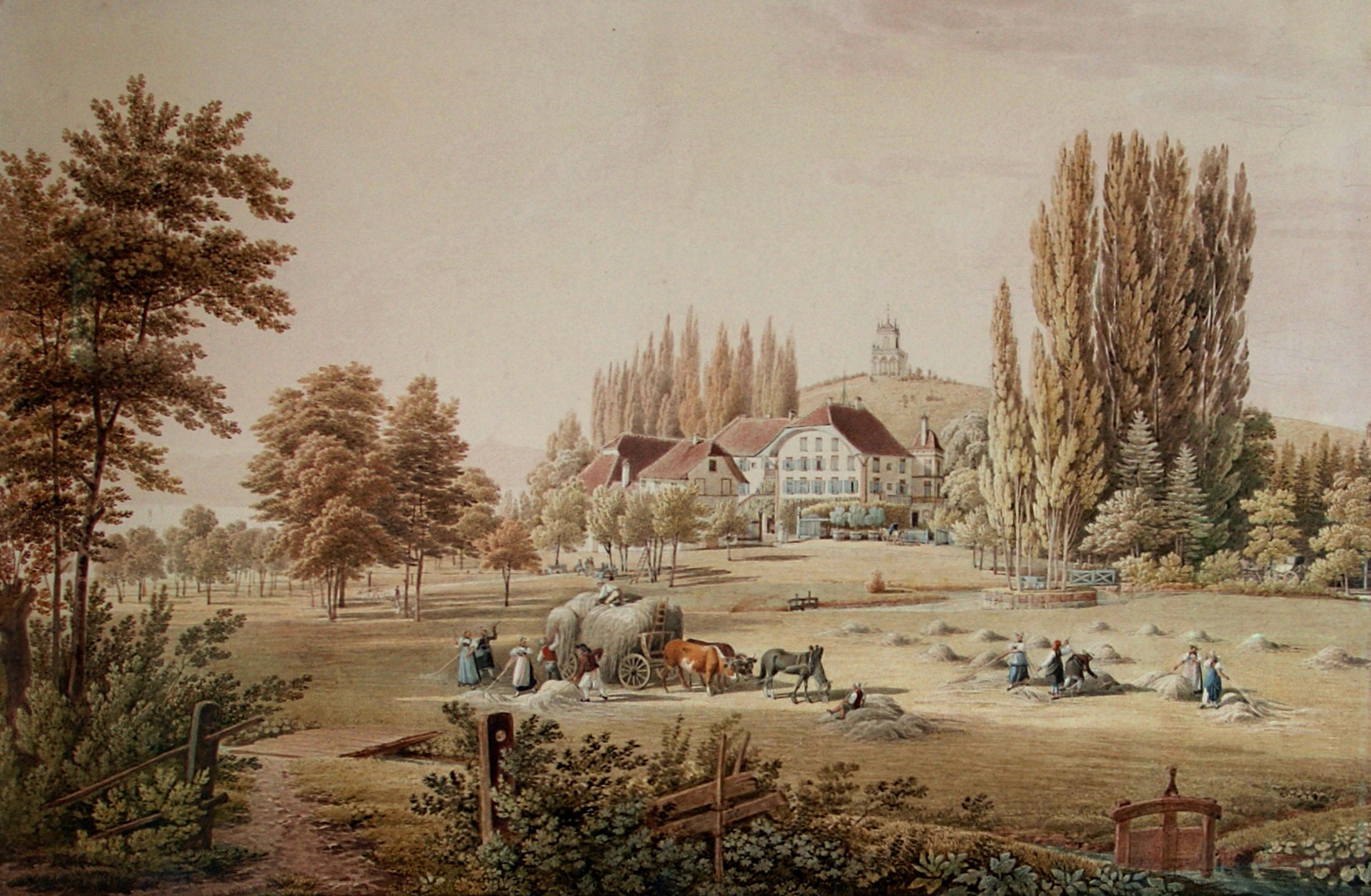 Ansicht von Schloss Löwenberg von Gabriel Lory fils, entstanden um 1830.